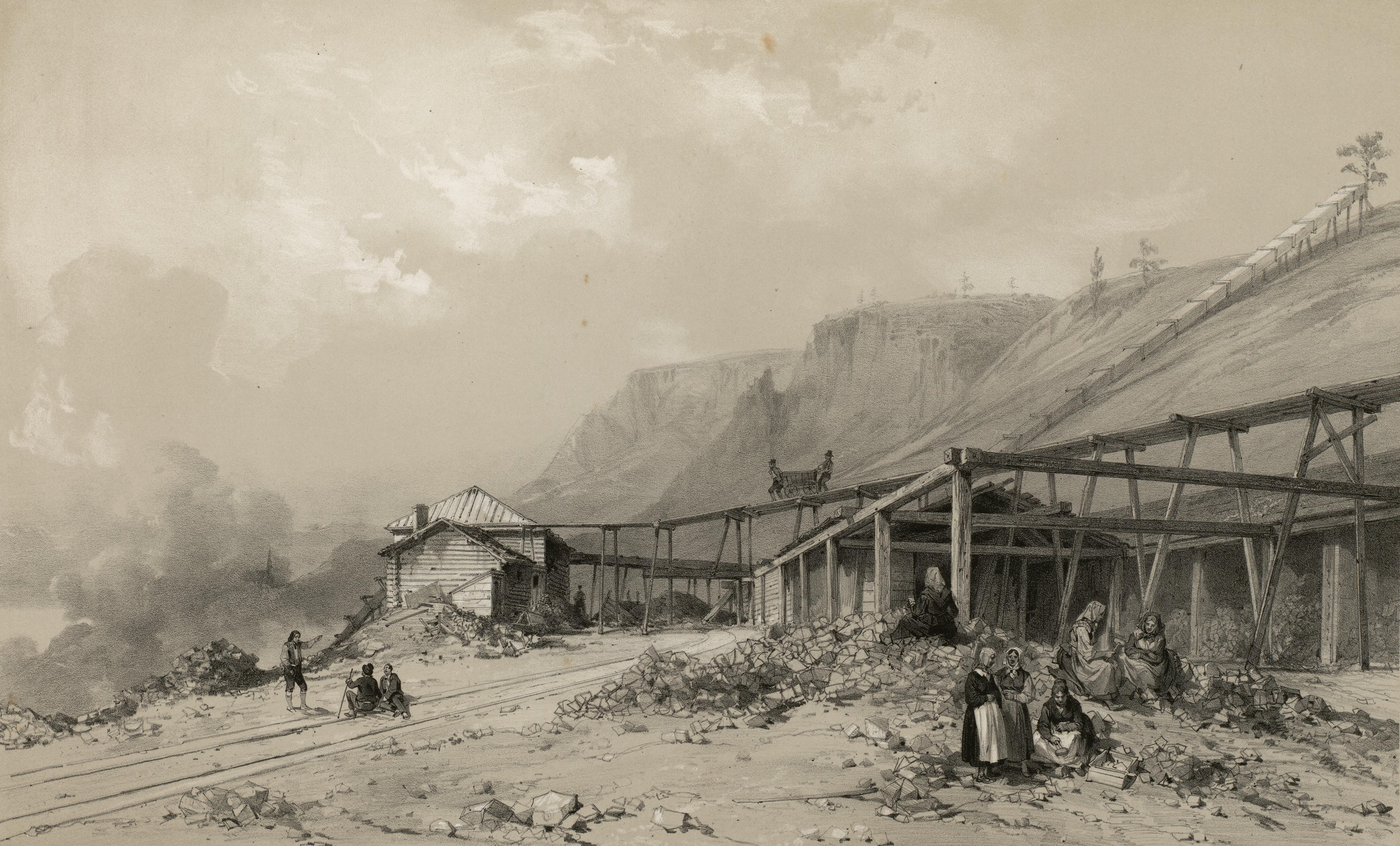 Kåfjord kobberverk. Illustrasjon hentet fra boken "Voyages de la Commission scientifique du Nord, en Scandinavie, en Laponie, au Spitzberg et aux Feröe" av ukjent forfatter og utgitt av Arthus BertrandParis : Arthus Bertrand, [1852] (Paris, [1852]) Dette er en litografi utført av Adolphe Bayot etter en tegning av Auguste Mayer. Mayer var en av flere kunstnere som deltok på forskningsekspedisjoner i de nordiske havområdene ombord i korvetten "La Recherche" i årene 1838, 1839 og 1840.